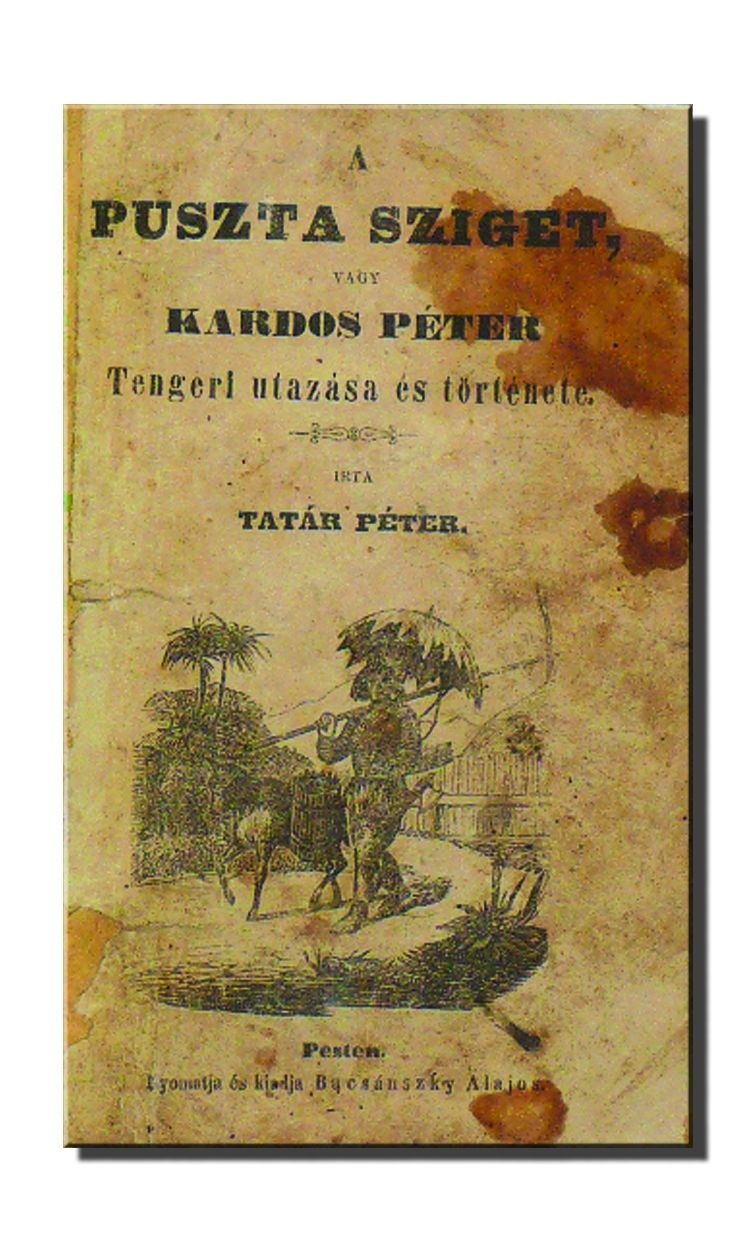 Medve Imre alias Tatár Péter: A puszta sziget vagy Kardos Péter tengeri utazása és története című művének címlapja. Pest: Bucsánszky 1862. Magyar Robinzonád, Campe után, magyar viszonyokra alkalmazva.